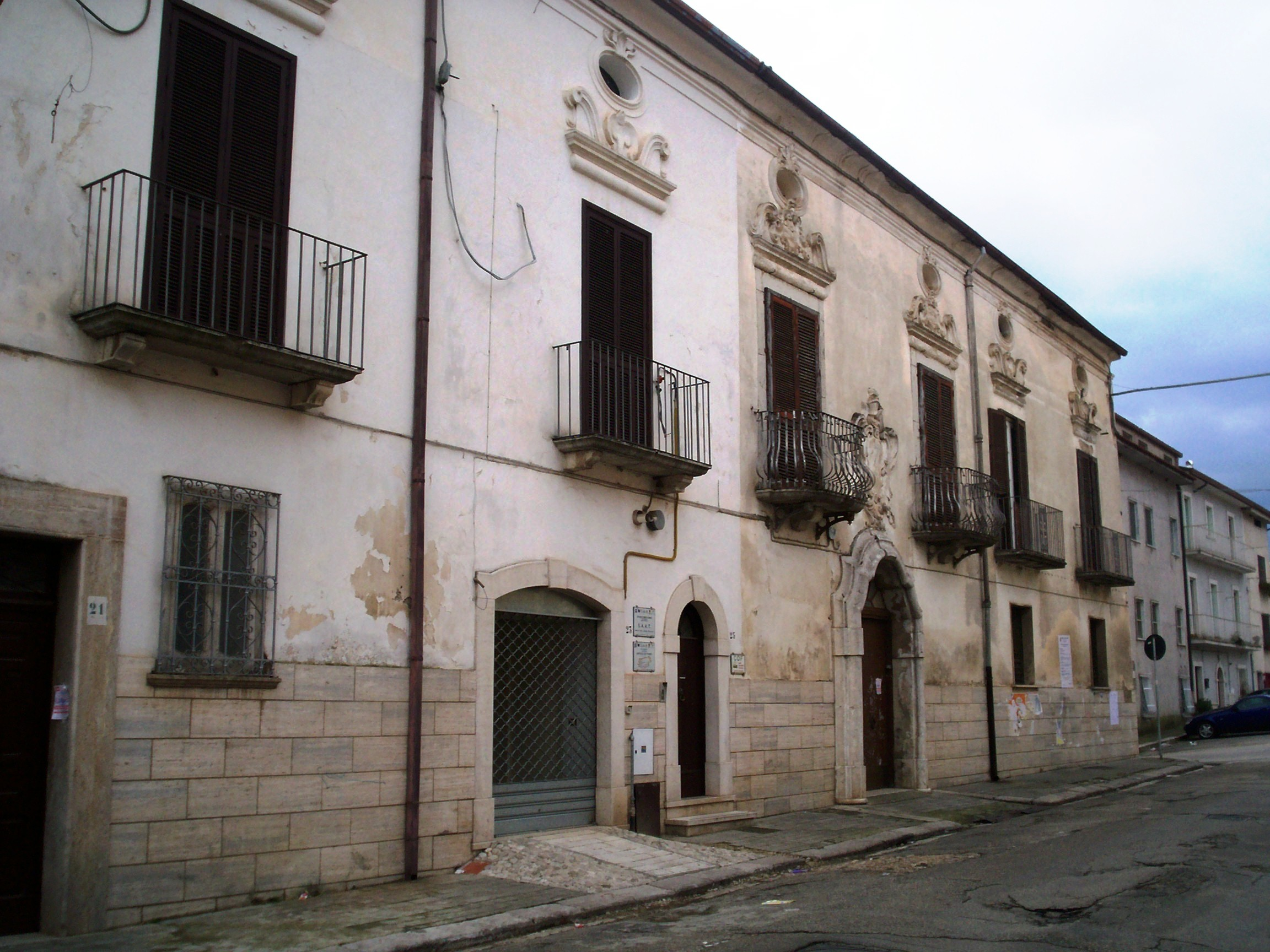 La facciata su via Biondi del Palazzo Ciaburro in Cerreto Sannita (Bn).